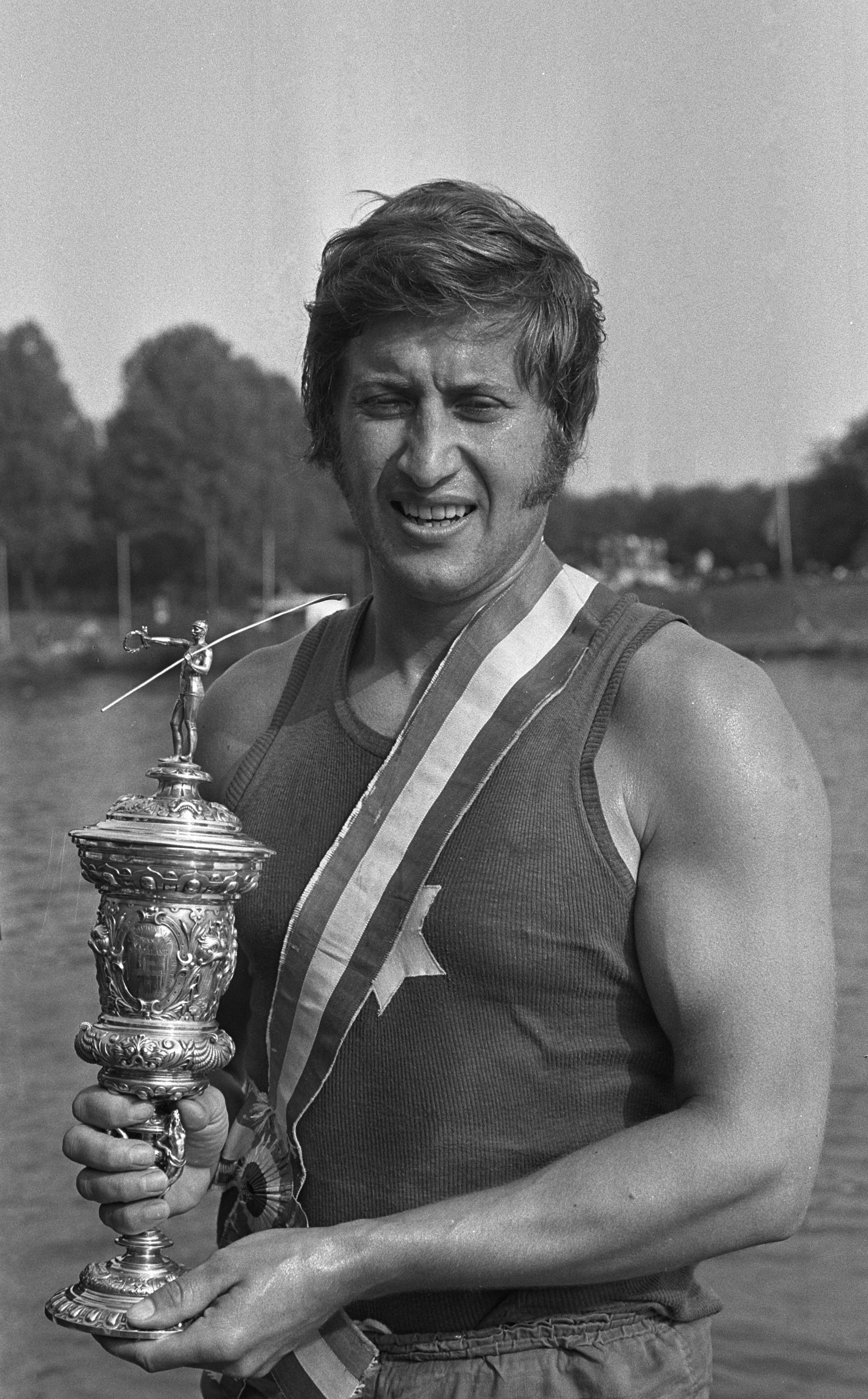 Wolfgang Glock (West-Duitsland), winnaar van de Hollandbeker, met de uit 1860 stammende trofee